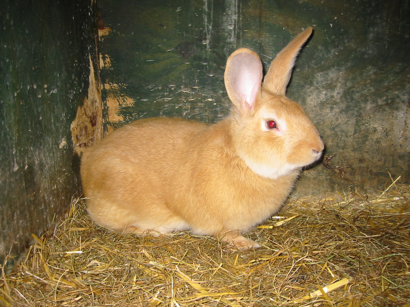 Eigen foto. GerardM 24 apr 2004 06:51 (CEST)